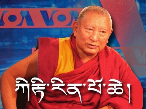 Kirti Rinpoche